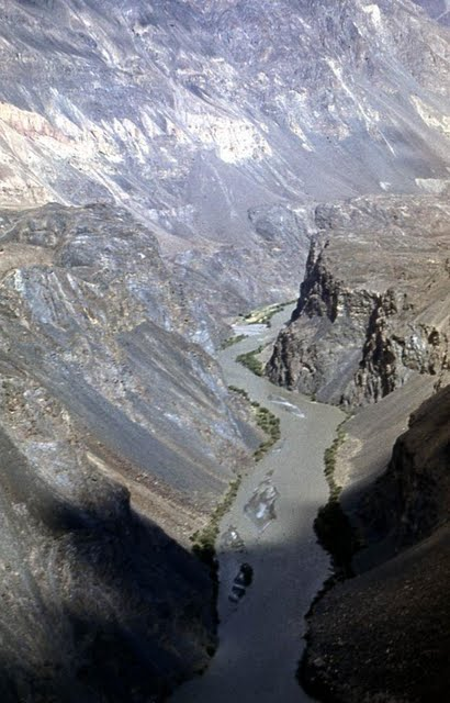 Река Бартанг с высоты птичьего полёта